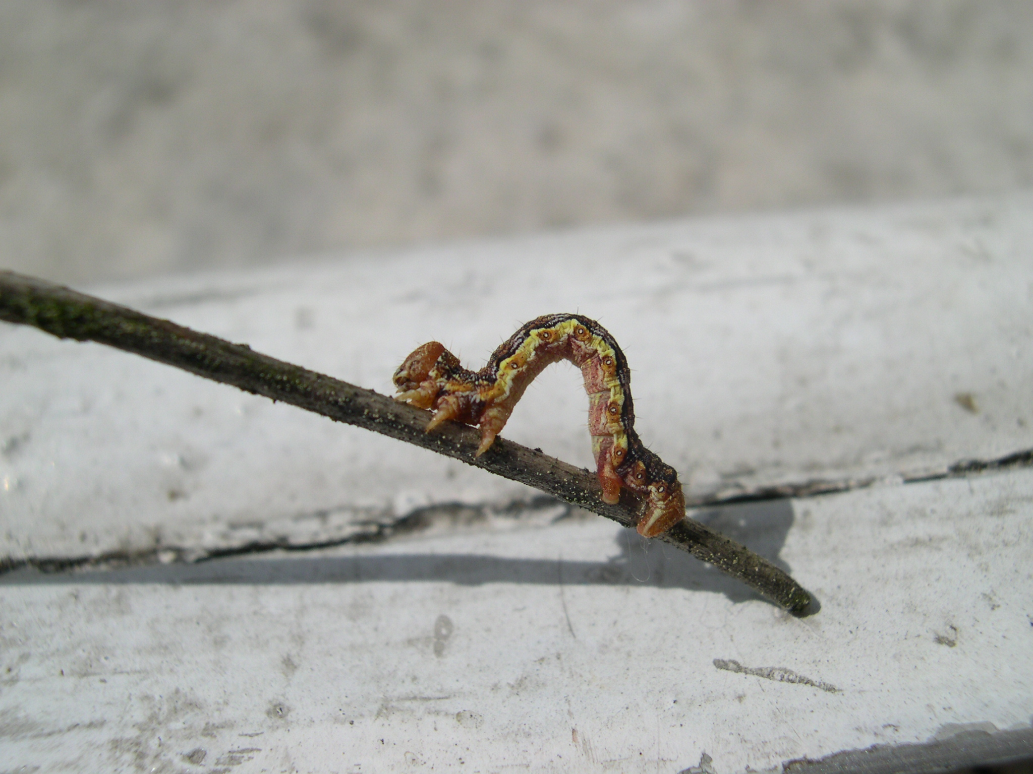 Chenille sur une branche